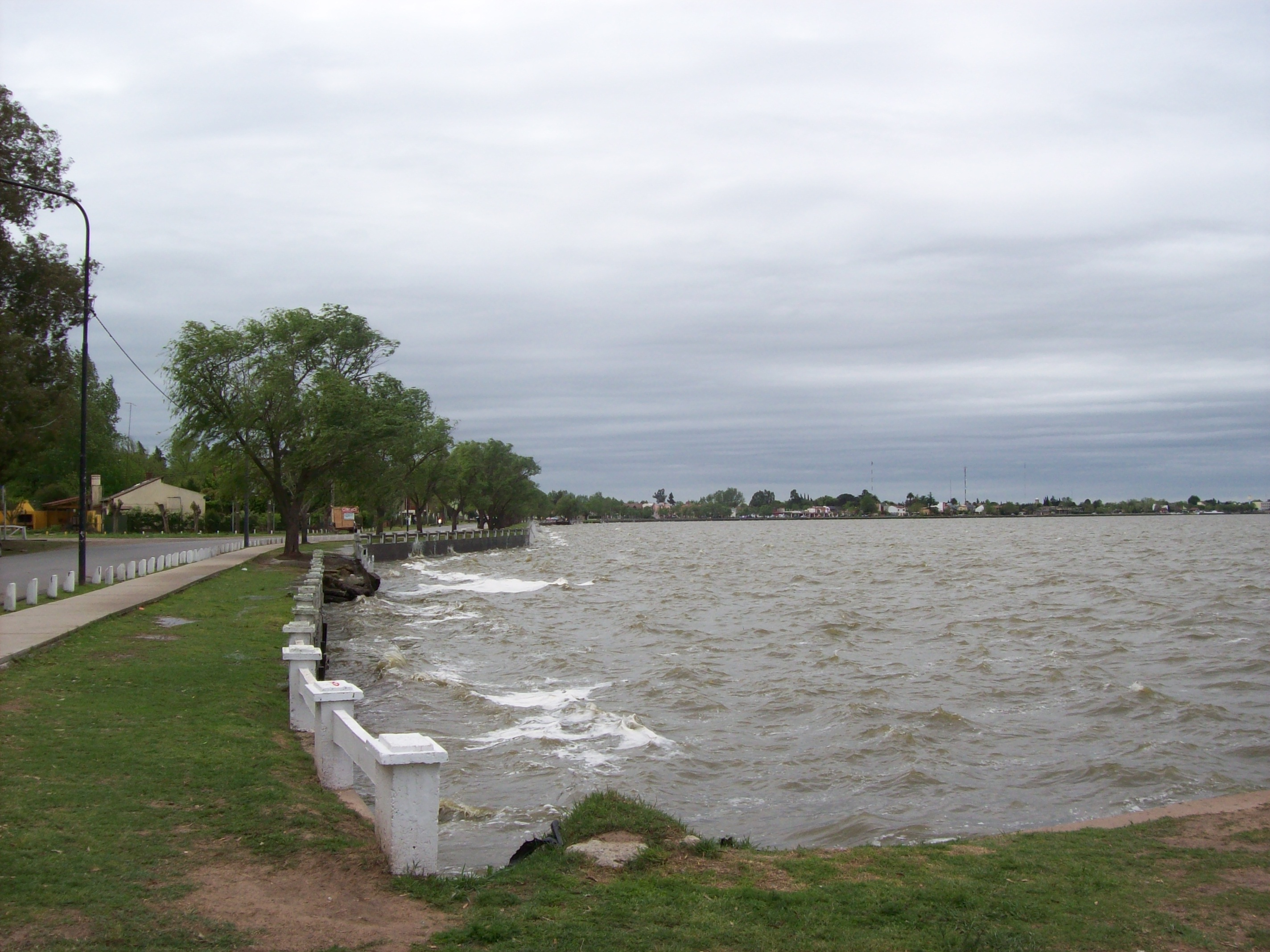 Laguna de Monte en San Miguel del Monte, Provincia de Buenos Aires, Argentina.